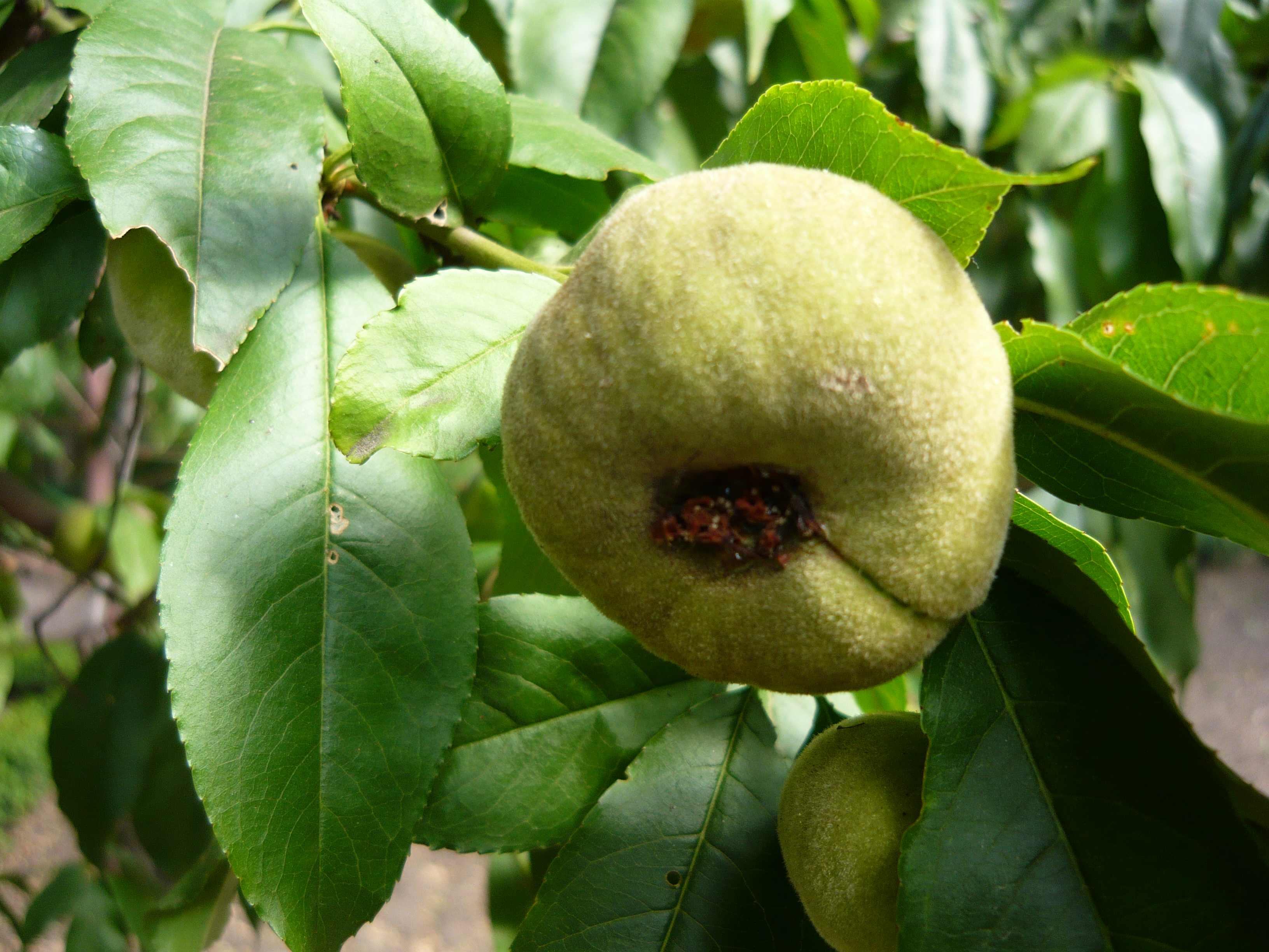 Prunus persica var. compressa, paraguayo. Real Jardín Botánico de Madrid.